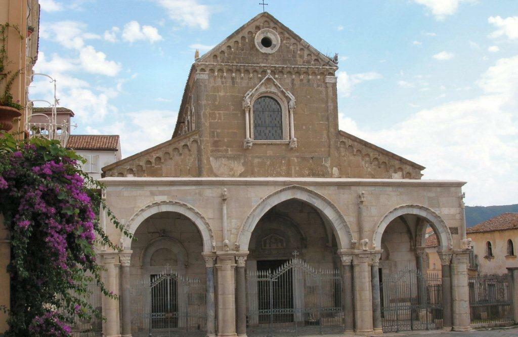 Sessa Aurunca - Duomo: Costruito Nel 1103 E Uno dei Più significativi di architettura romanica Applicability in Campania. Presenta ONU interessante connubio tradi Materiali di reimpiego provenienti da antichi Edifici romani (Tempio di Mercurio e di Ercole, Teatro), Caratteri dell'Architettura romanica ed Elementi del restauro barocco Avvenuto Intorno al 1758. La facciata, con frontone triangolare superiore e finestrone centrale, preceduta da E ONU portico del XIII Secolo a tre arcate sorrette da Pilastri e colonne. Sotto il porticato SI aprono i tre portali di alla chiesa accessori decorati con architravi ed Elementi marmorei di spoglio. La pianta e A croce latina, a tre navate da colonne di Divise diversificato Materiali. Pregevole e Il Pavimento musivo del XII Secolo Nella navata centrale. Di grande Valore artistico Sono inoltre il candelabro per il cero pasquale ed il pulpito, opere del XIII Secolo del maestro Peregrino da Sessa. Il candelabro ha base di Scolpita con una figura di Rilievo e inserti di mosaico, il pulpito decorato da mosaico e bassorilievi E una Struttura rettangolare, sorretta da sei colonnine Che Poggiano do leoni di marmo. Nella cappella del Sacramento, da ammirare e La Comunione degli Apostoli di Luca Giordano.